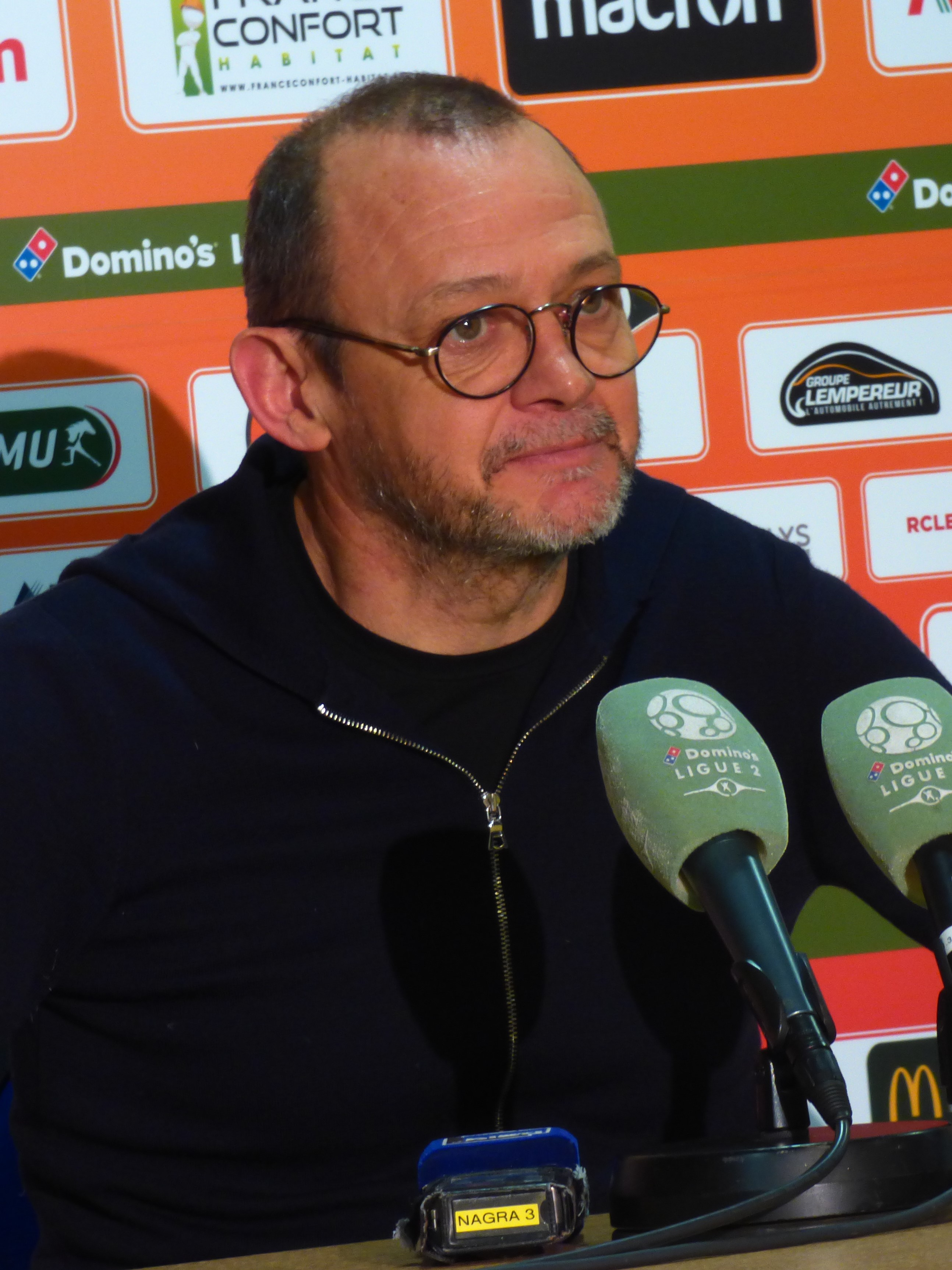 Pascal Plancque après le match Lens / Niort, le 21 décembre 2019, comptant pour la dix-neuvième journée du championnat de France de football de Ligue 2 2019-2020.